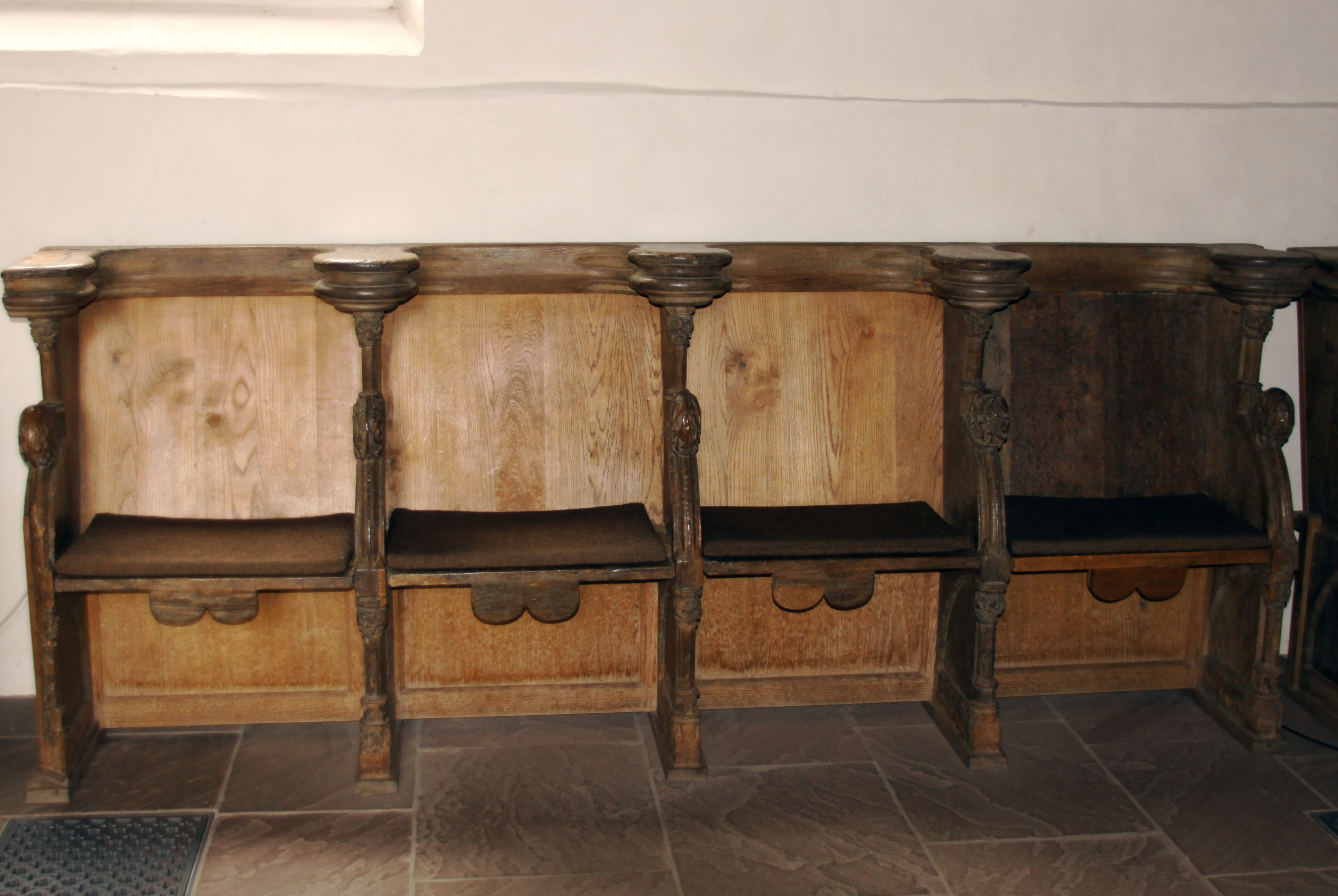 Gestühl aus dem Kloster Barthe in der St.-Georg-Kirche (Nortmoor)